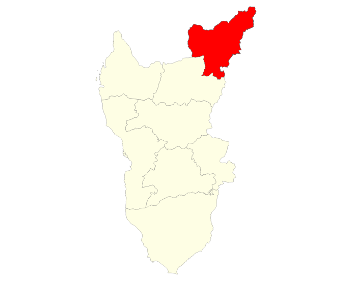 Localisation du district de Beroroha dans la région Atsimo Andrefana